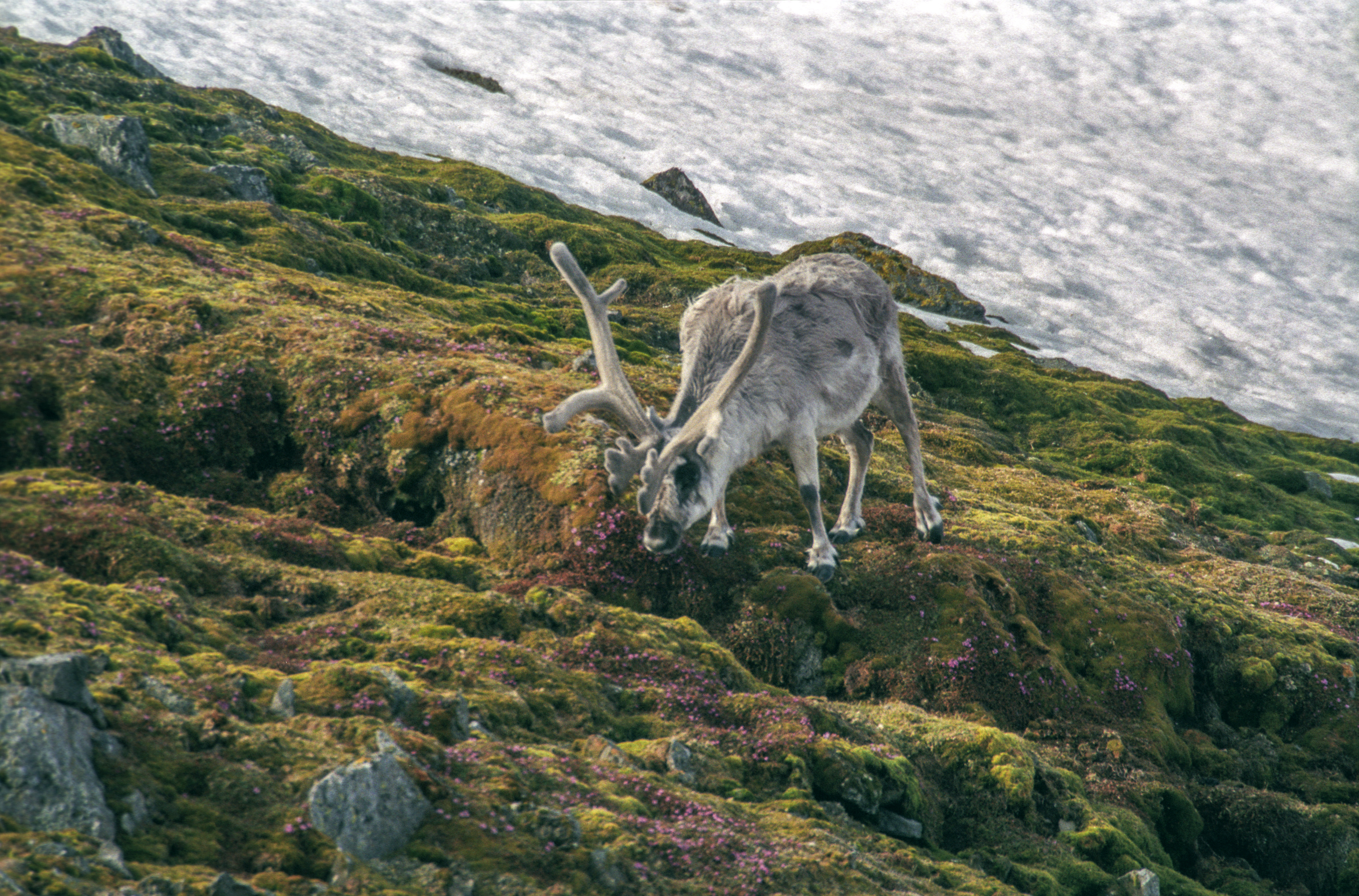 spitsbergen, Reindeer